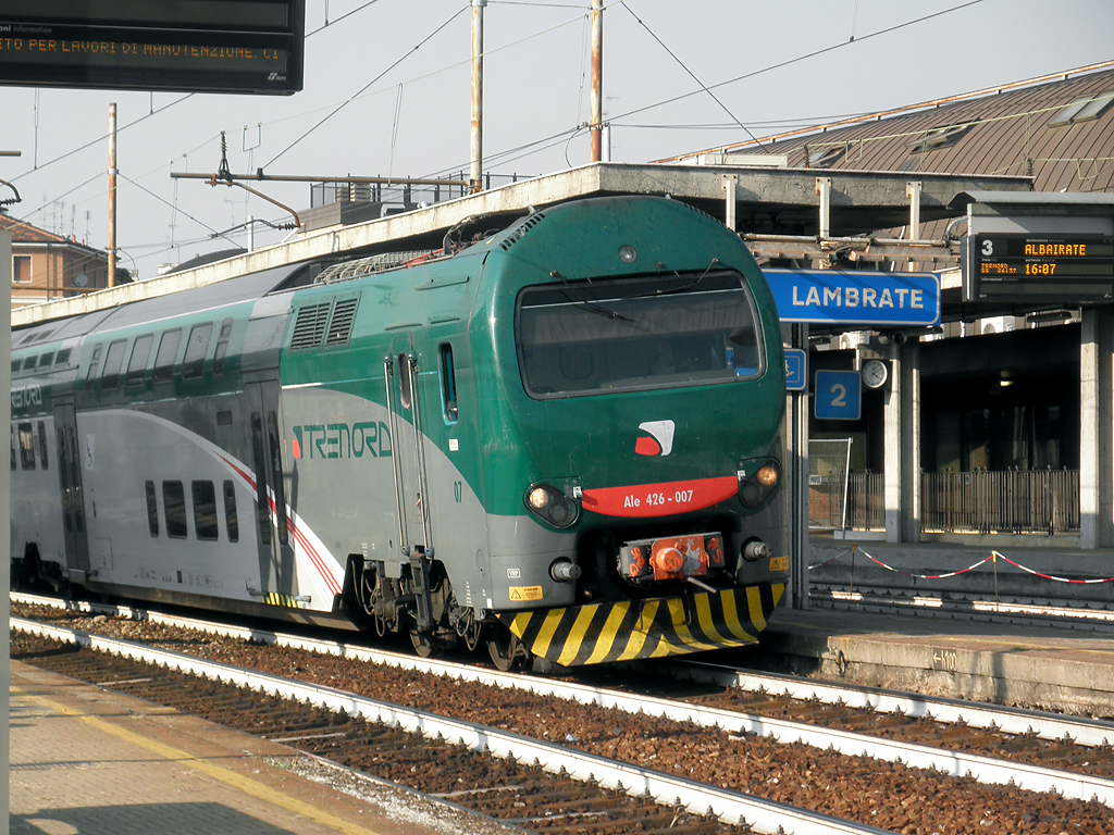 Elettrotreno TAF di trenitalia in livrea Trenord, in servizio sulla linea S9 del servizio ferroviario suburbano di Milano, in stazione di Milano Lambrate